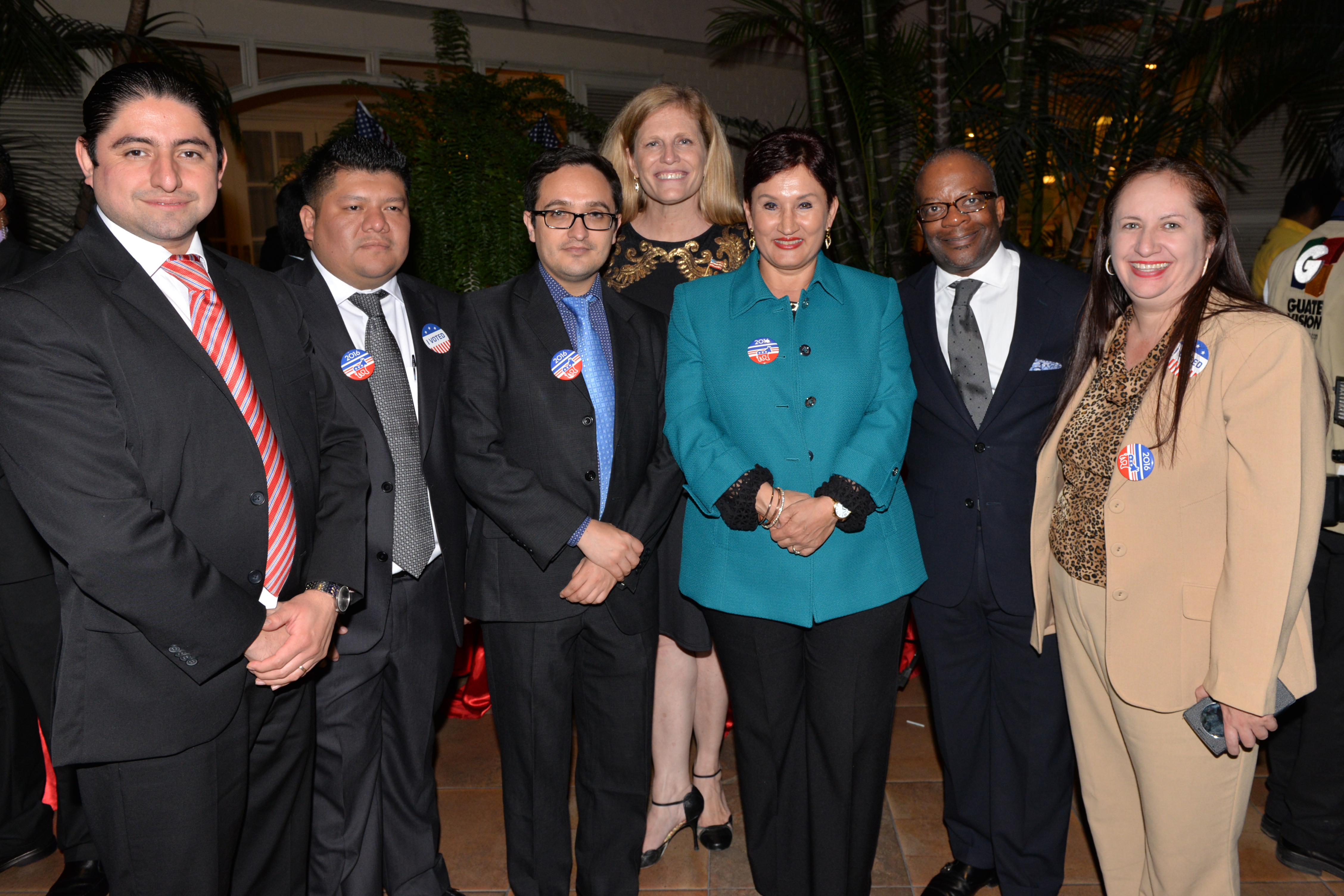 Elecciones Estadounidenses Embajada USA Guatemala